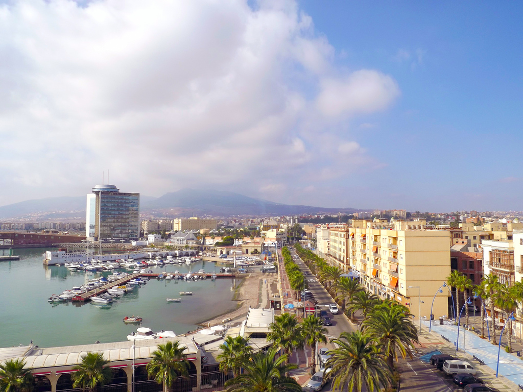 Dársena